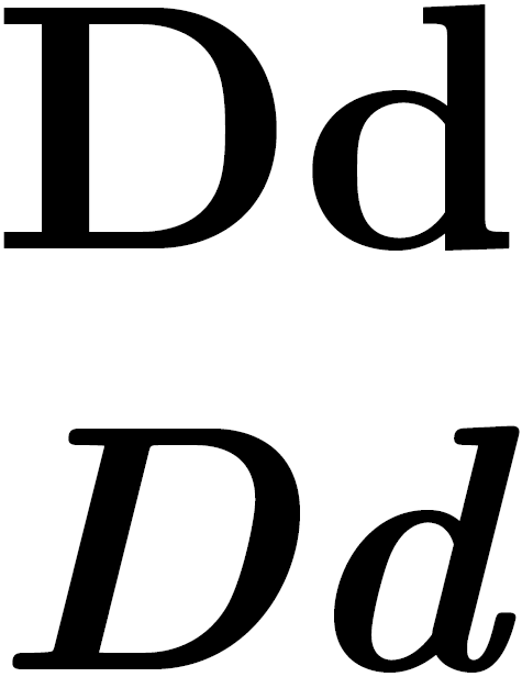 Latin letter D